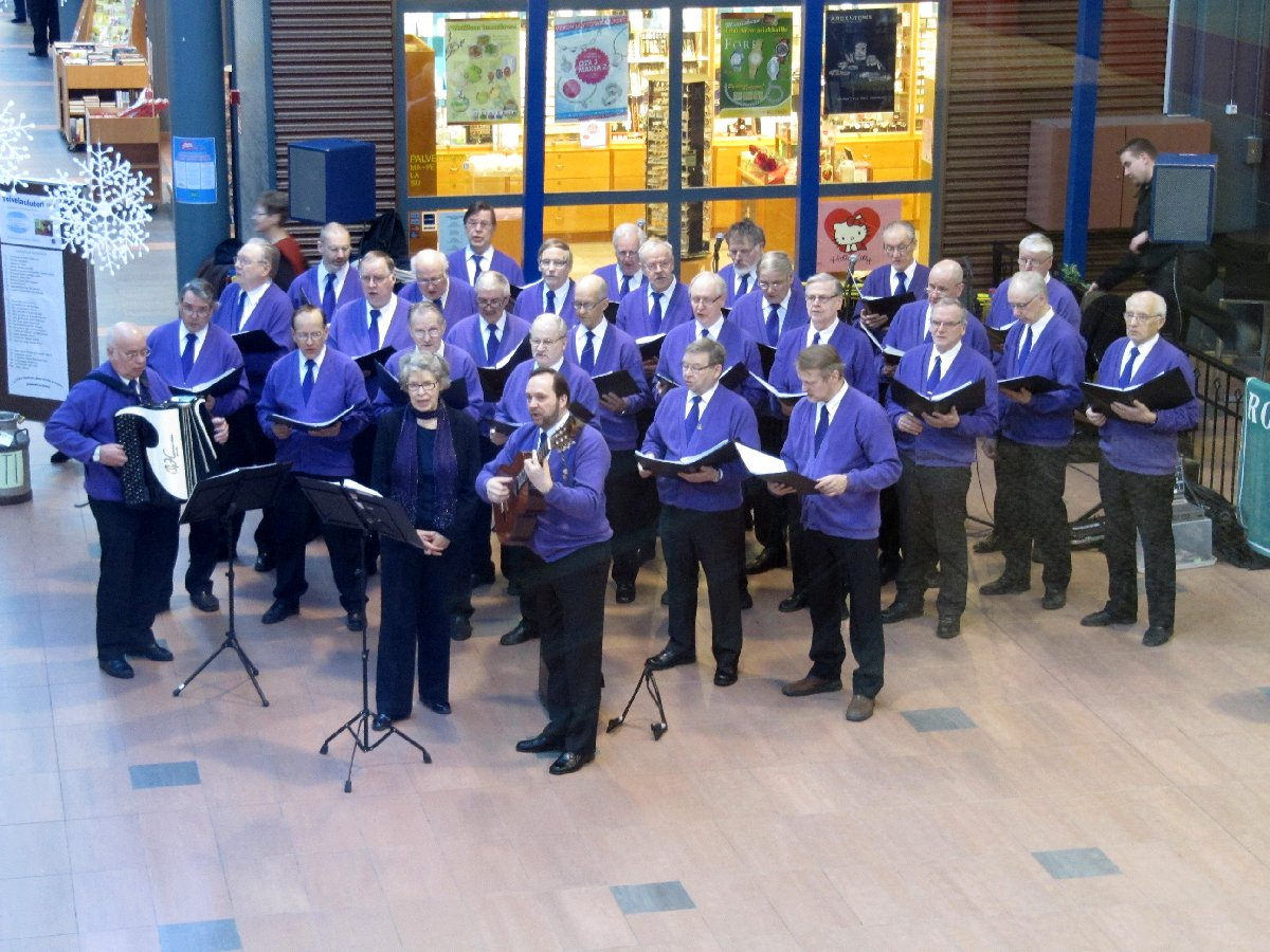 Viestiveljet: Toivelauluja yhteisvastuun hyväksi vuonna 2010. Tauno Vesterinen, hanuri, kuoron varajohtaja Elna Muhonen,soolo, sekä kuoron johtaja Jarmo Ojanperä, kitara.